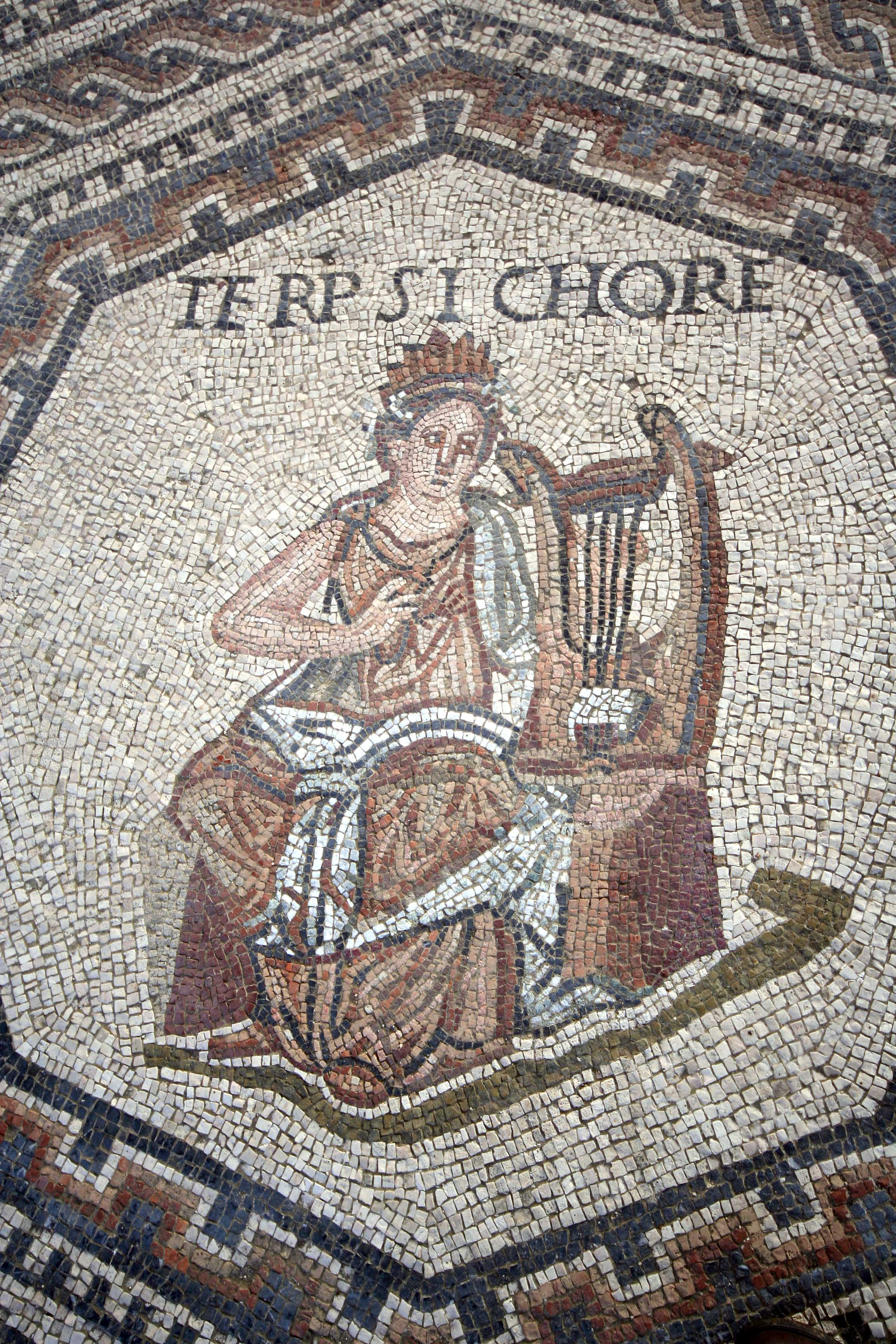 Viichtener Mosaik:Terpsichore